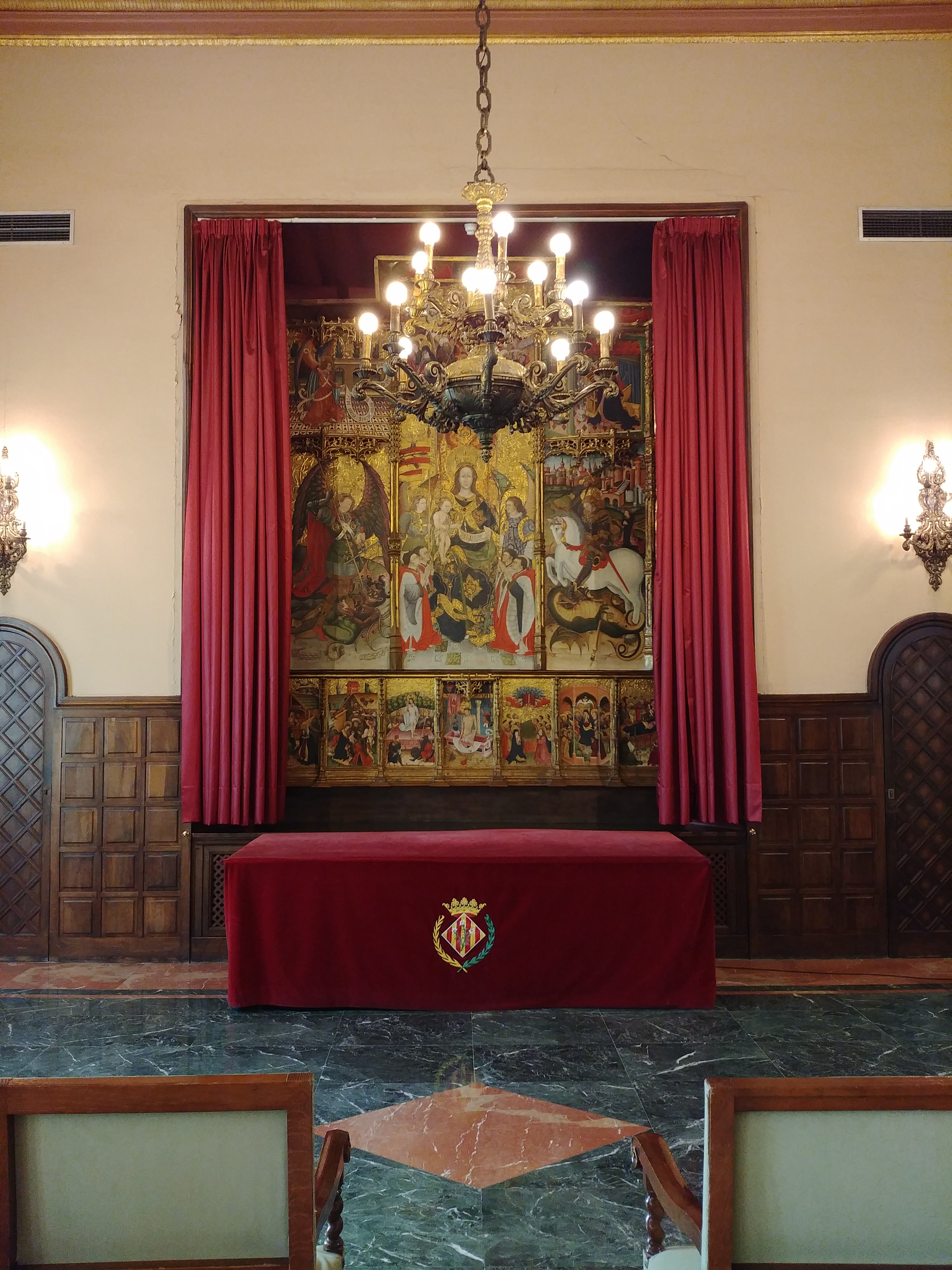 Espai a la dreta de l'entrada a la sala de plens